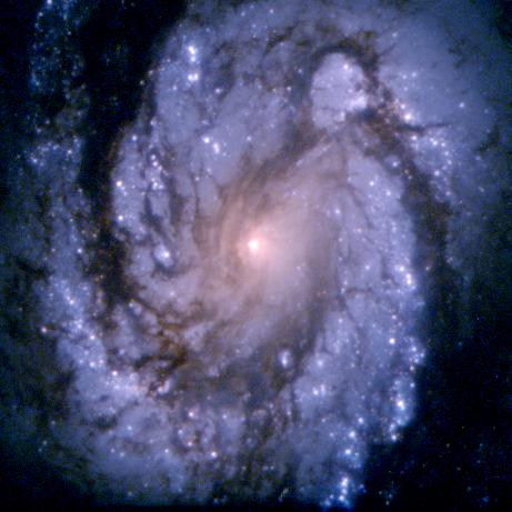 Spiral Galaxy M100